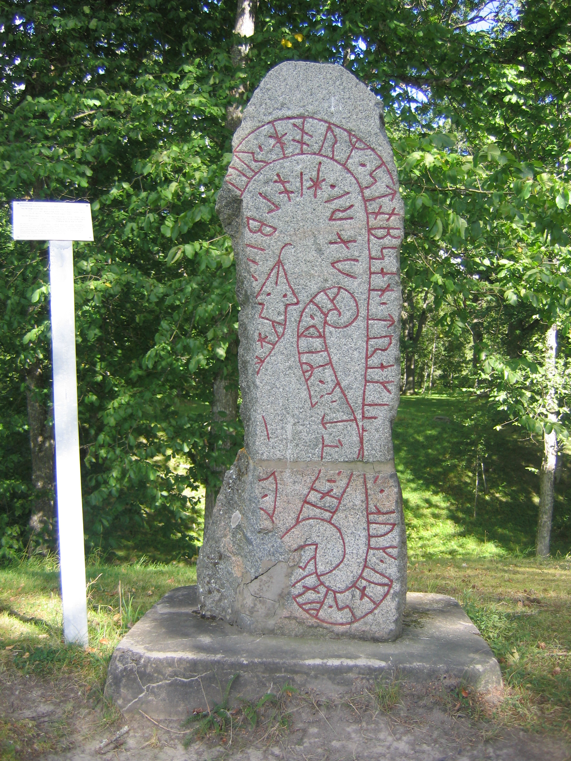 runestone Vs 19 in Berga, Västerås.